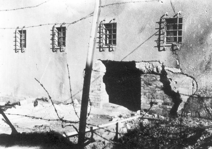 הפירצה בבניין משטרת צמח